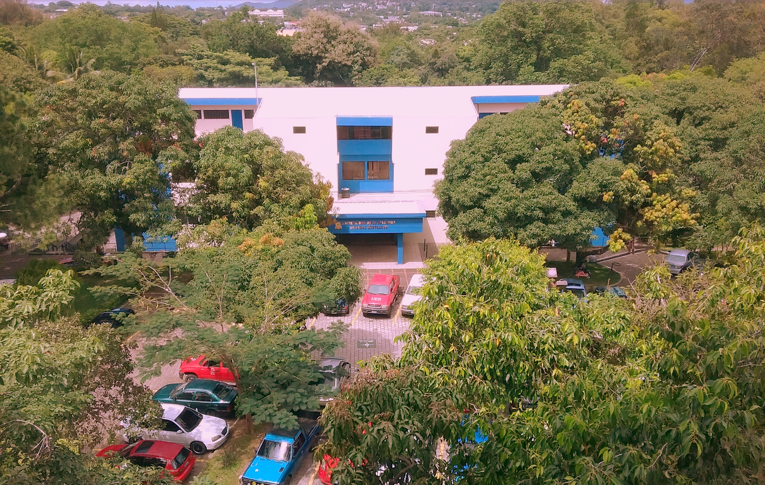 Edificio de las oficinas centrales de la Universidad de El Salvador.